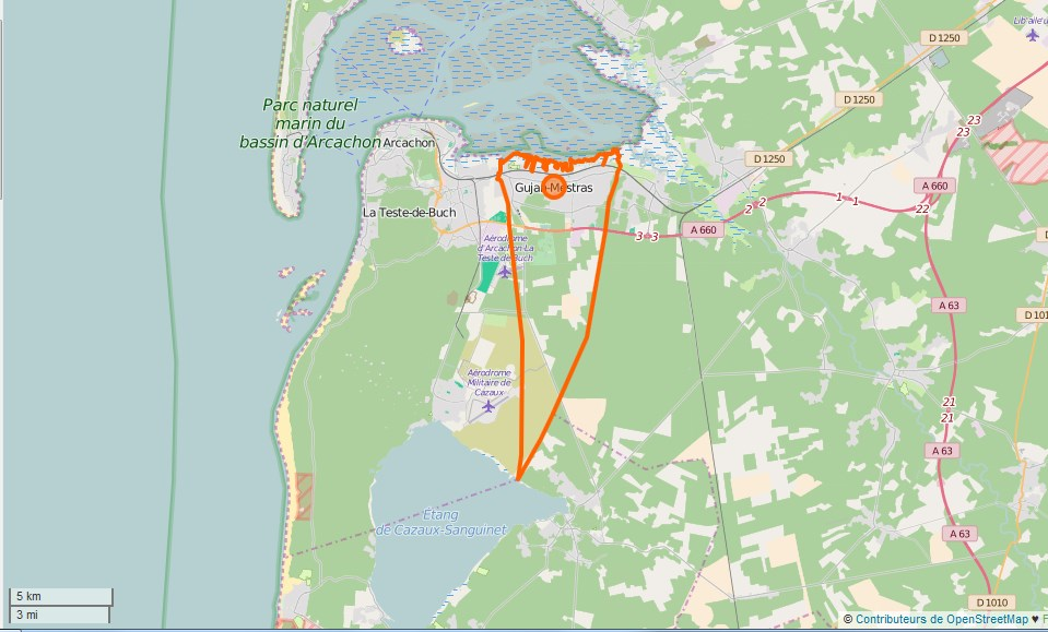 Gujan-Mestras Limite communale This map may be incomplete, and may contain errors. Don't rely solely on it for navigation.